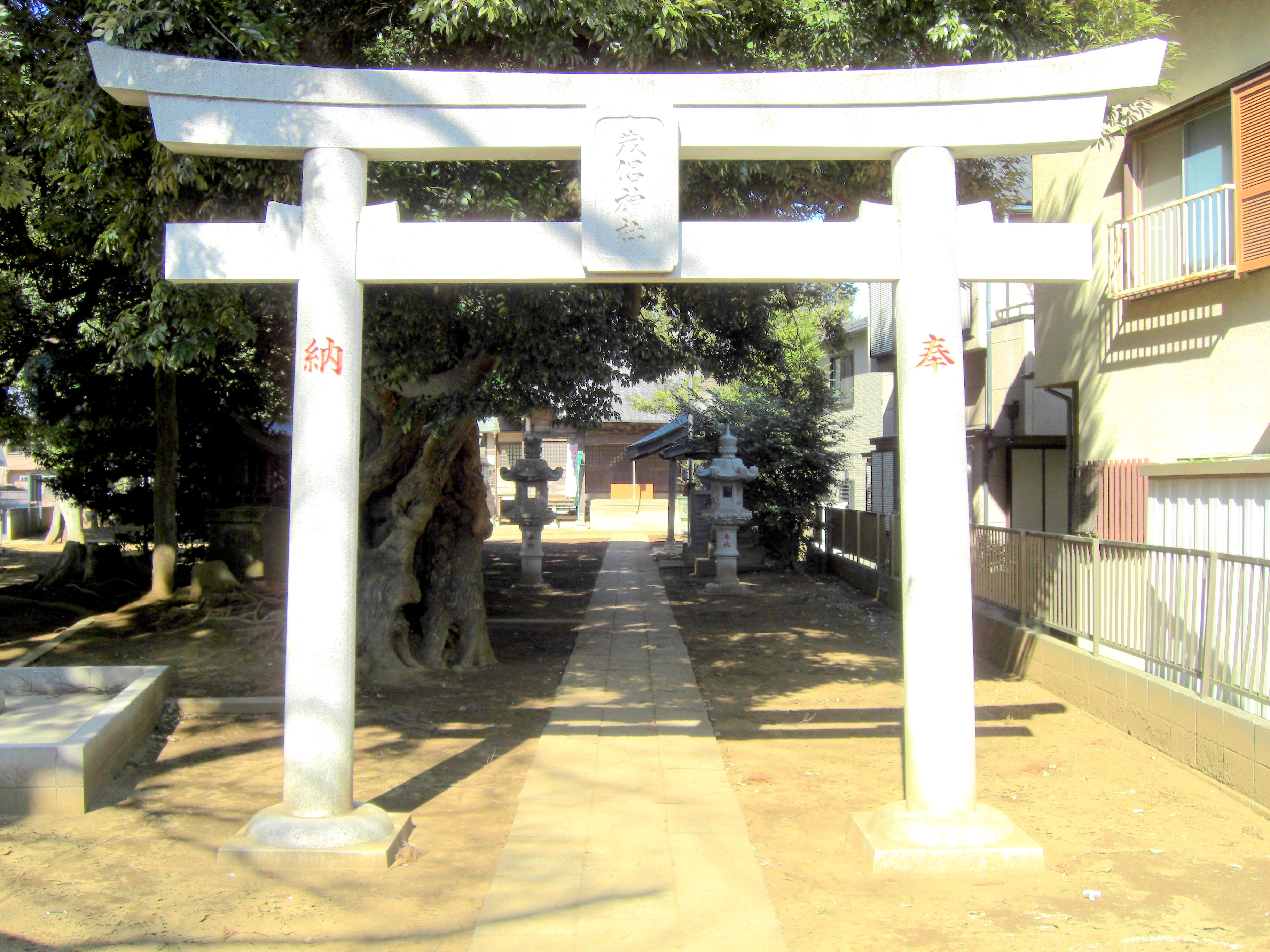 茂侶神社（松戸市小金原5-28）